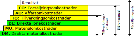 Kalkyltrappa